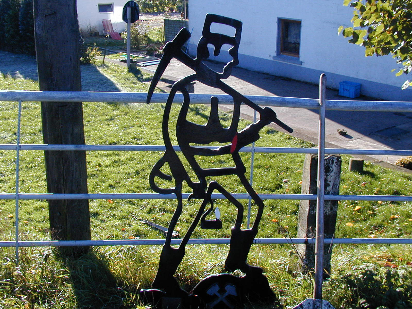 Skulptur am Bergbauwanderweg Deutschland in Sprockhövel, 2002 selbst fotografiert